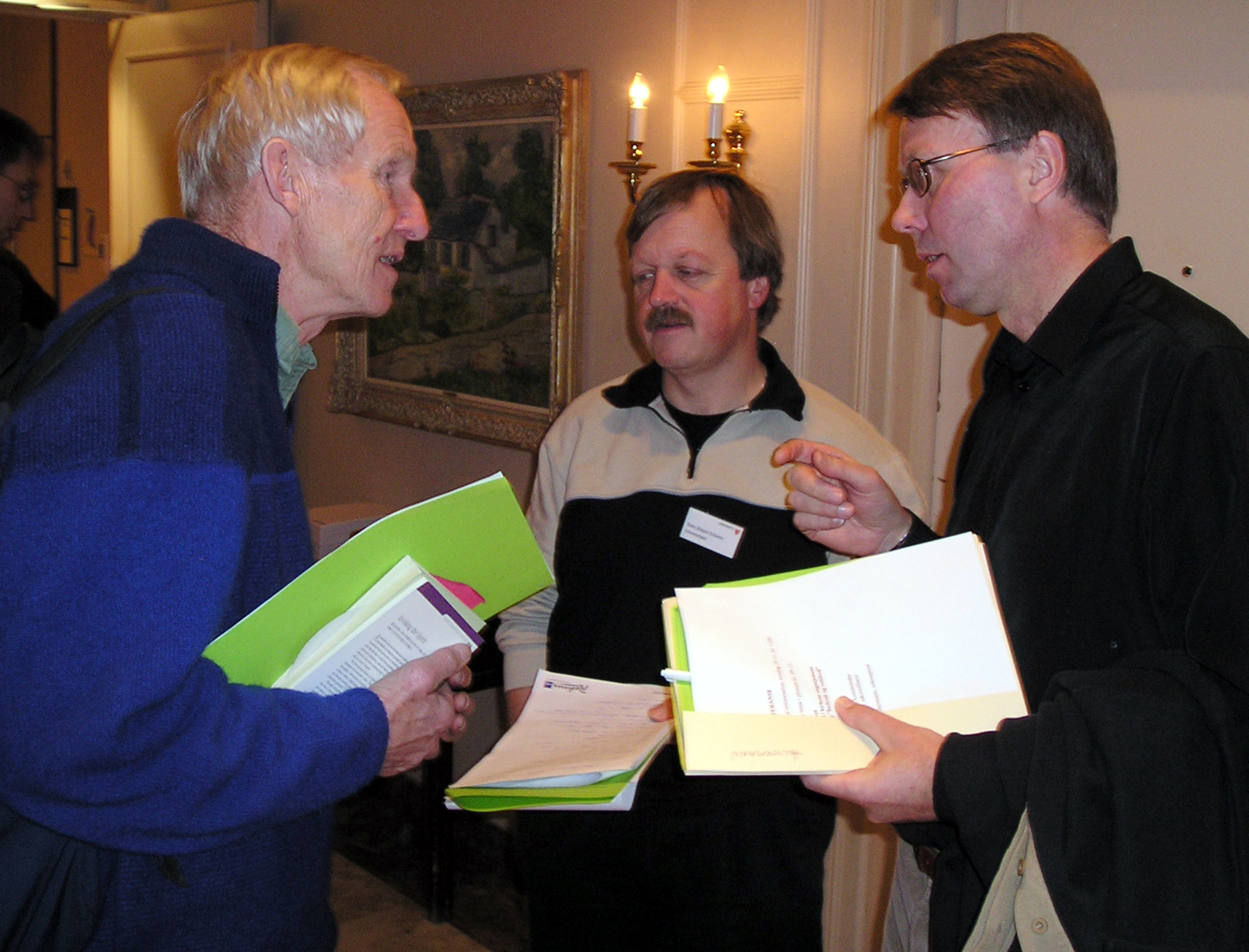 Styreleder i Worldwatch Institute Øystein Dahle (til venstre) sammen med Kirkerådets rådgiver i miljøsaker Hans Jürgen Schorre og Stamsund-presten Harold Holtermann. Fra Kirkemøtet 2003.